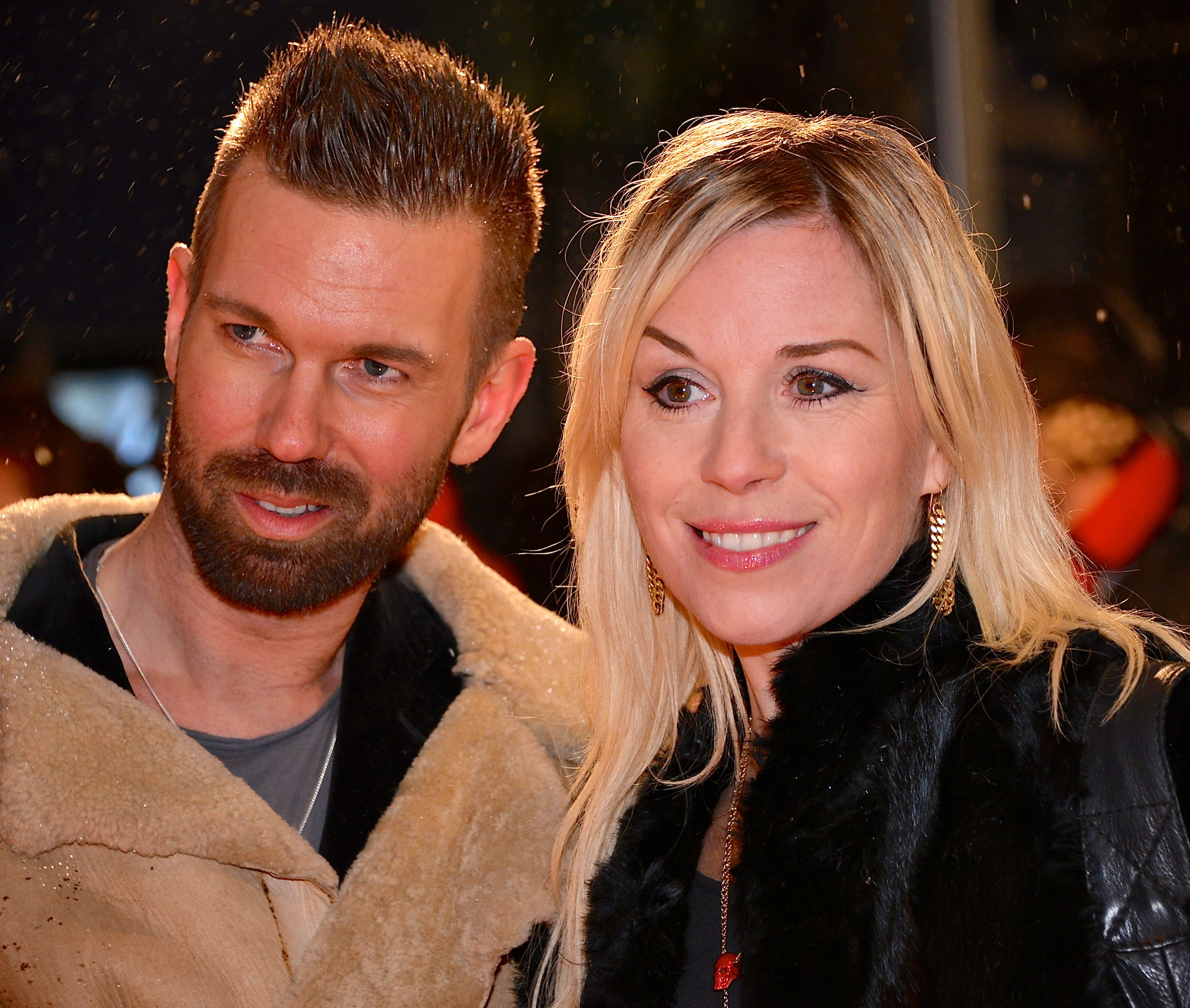 Martin Blix & Josefin Crafoord på filmpremiären av Jack Reacher i Filmstaden i Stockholm den 11 december 2012.